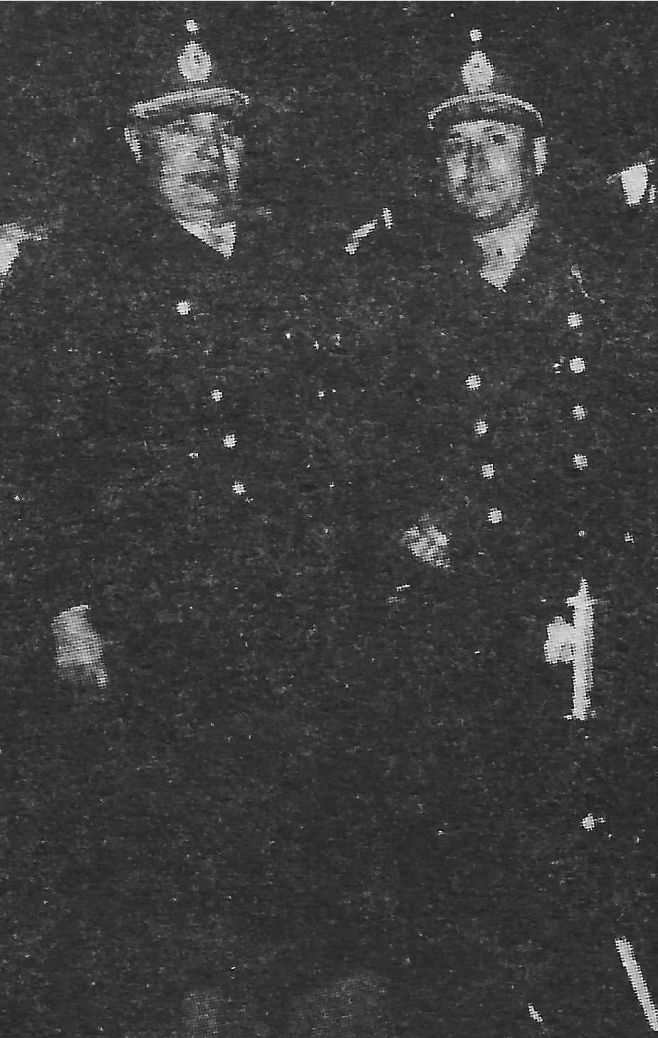 De izquierda a derecha: Teniente General José Domingo Molina Gómez y General de División Franklin Lucero.